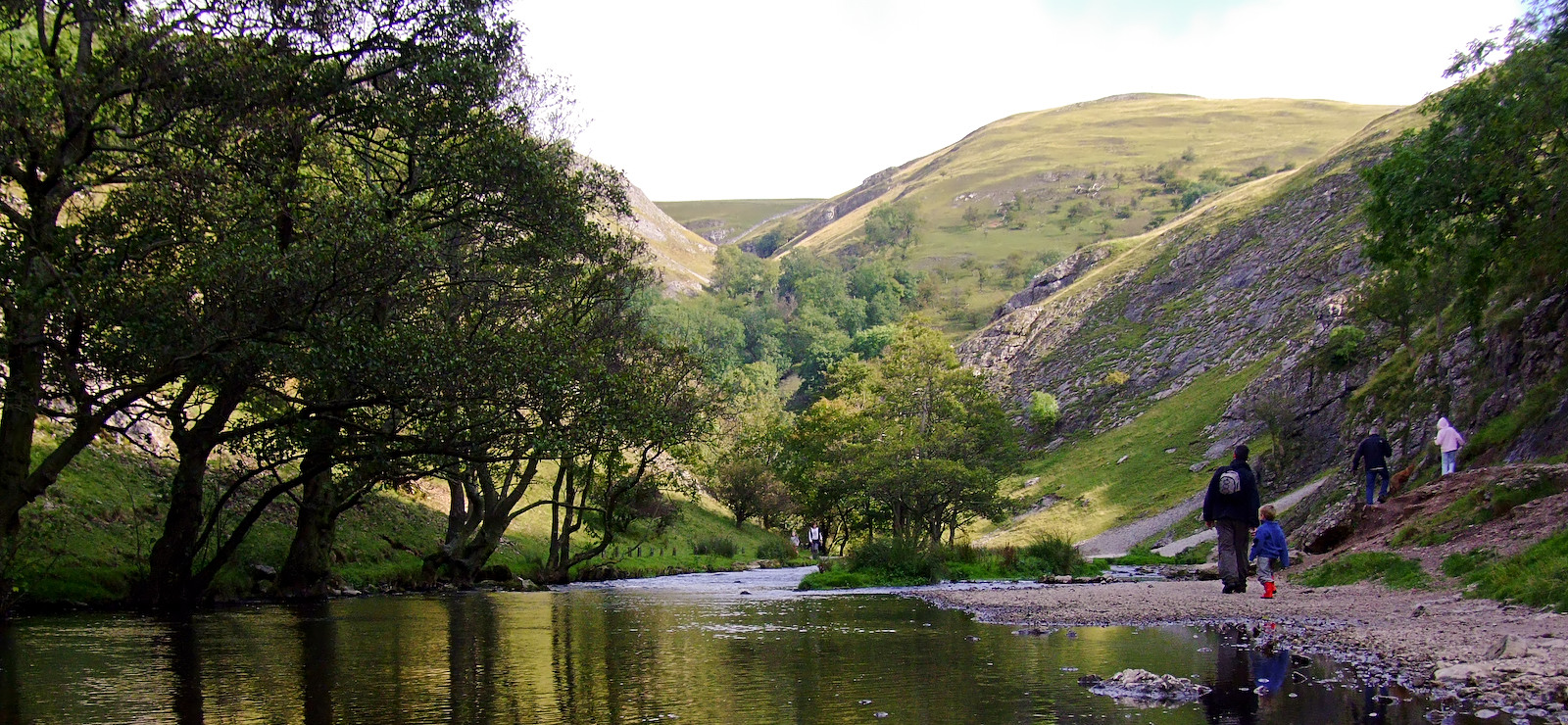 Dovedale